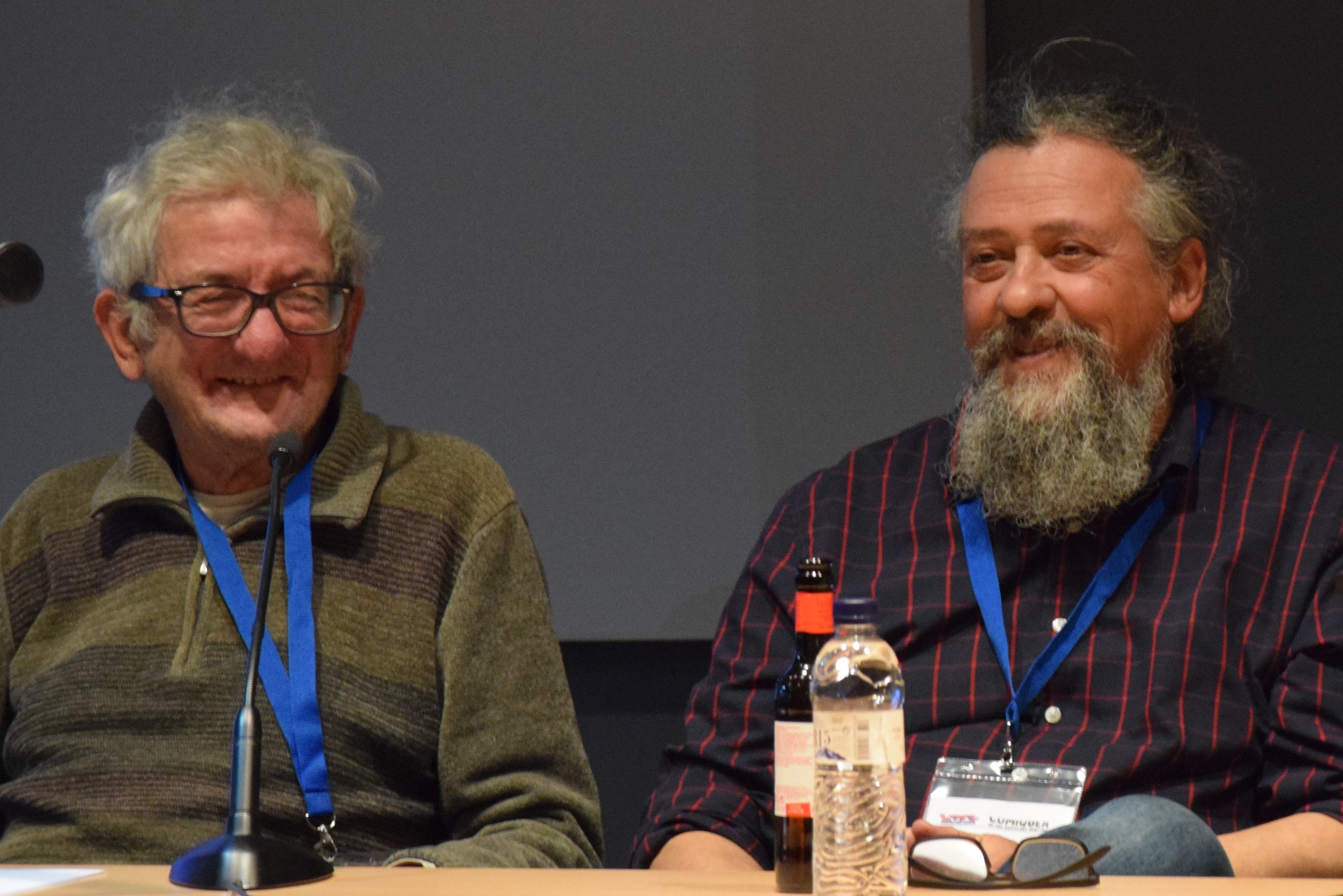 El guionista de còmics José Miguel González Marcén, conegut pel pseudònim Onliyú amb el dibuixant Francesc Capdevila, conegut com a Max, durant la taula rodona "El Víbora". Data: dissabte 6 d'abril de 2019. Horari: 12.30-13.30 h. LLoc: Saló Internacional del Còmic de Barcelona de 2019.